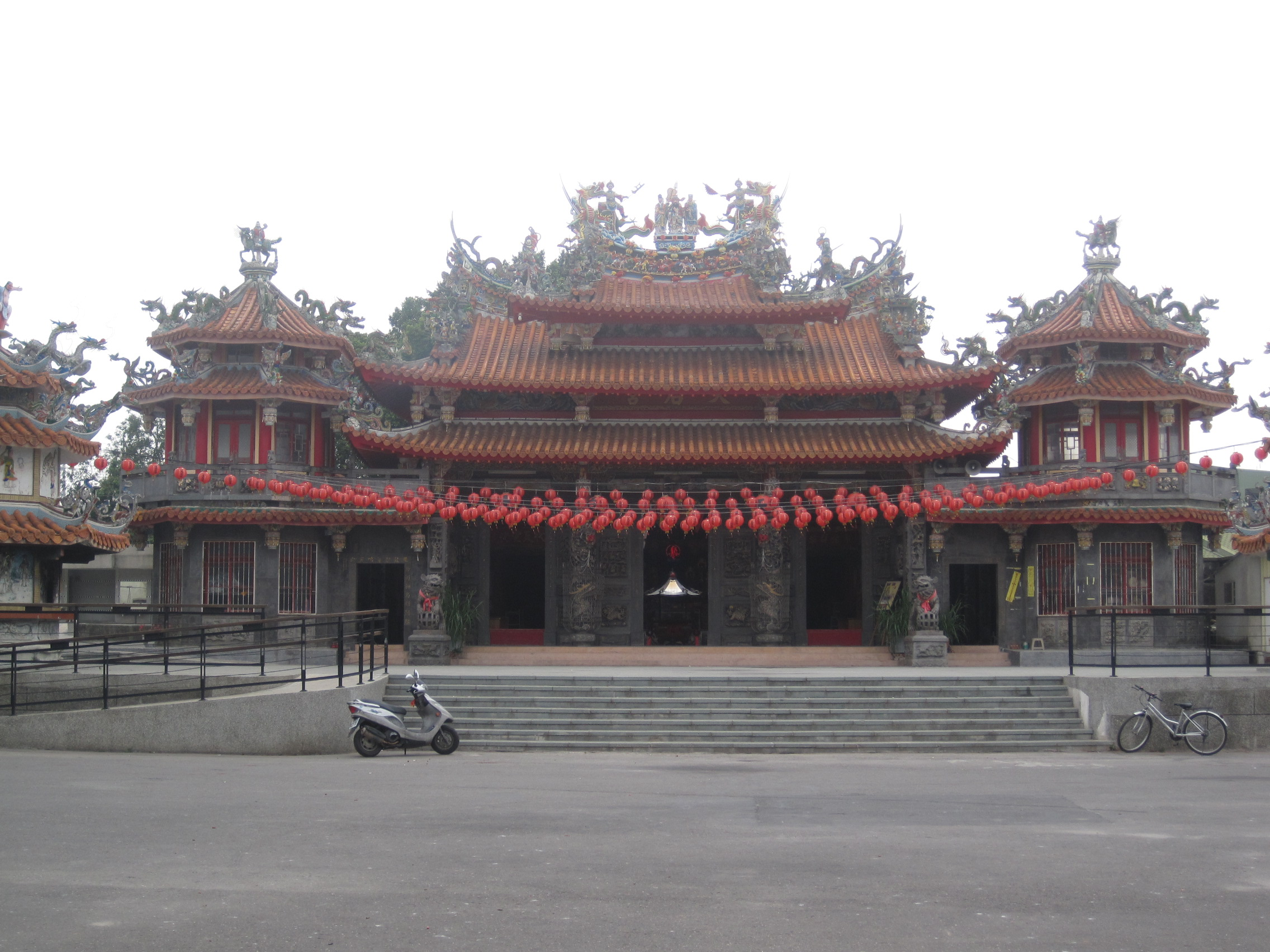 位於臺灣臺南市山上區的天后宮